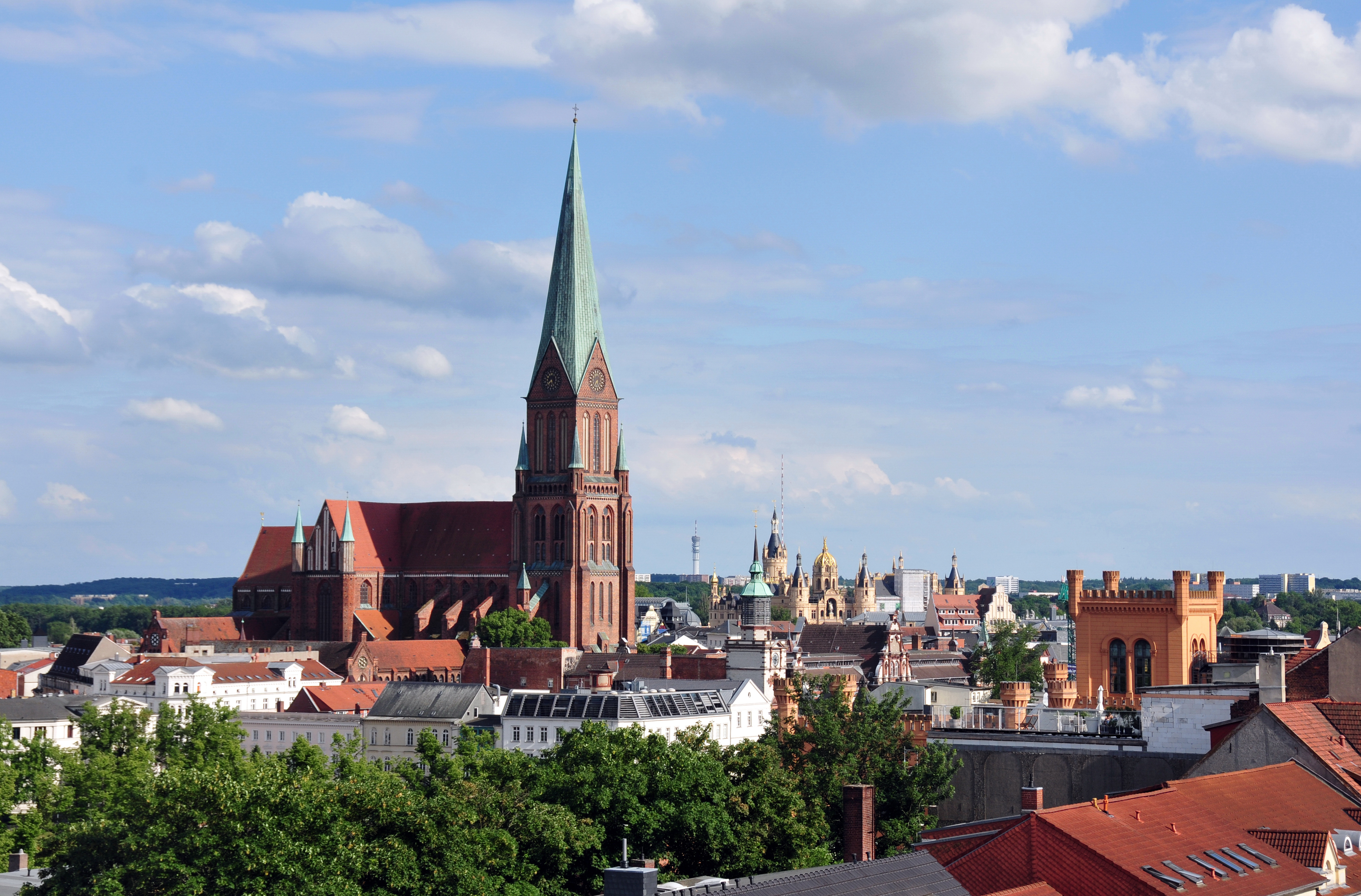 Schwerin; mit 50mm Brennweite von der Orangerie zum Bahnhof, Blick aus dem Hotel über die Stadt, ideale Brennweite